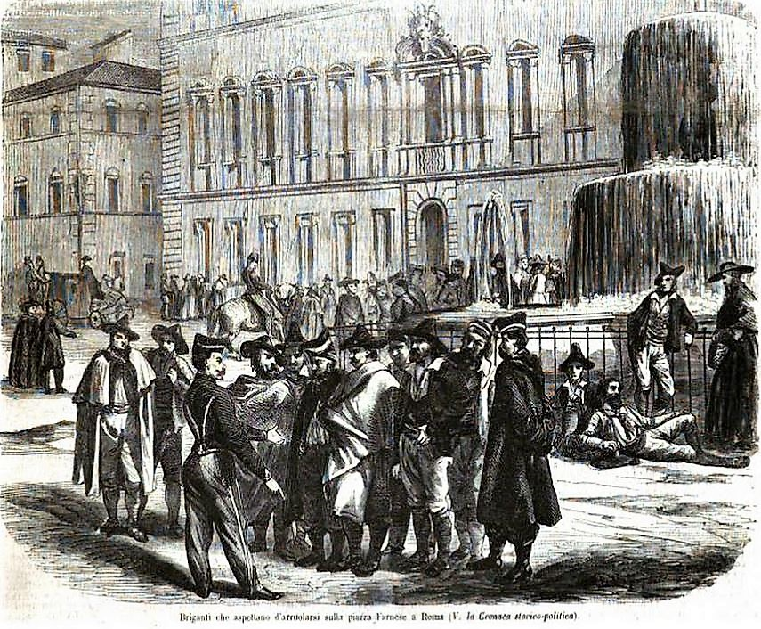 disegno di arruolamento di Briganti a Roma Piazza Farnese